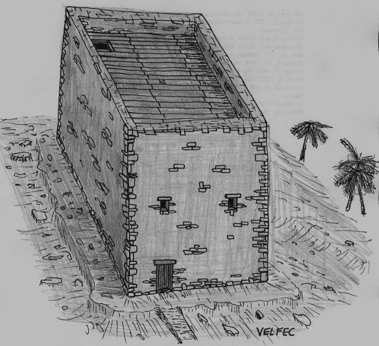 Rekonstruktionsversuch eines römischen Centenariums (bef. Bauernhaus) in Nordafrika.